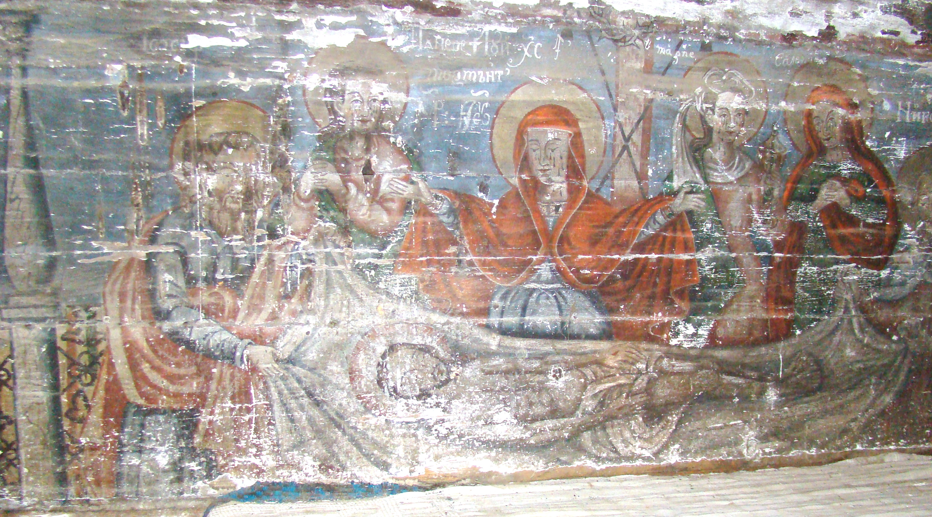 Altar, la proscomidie: Punerea în mormânt. Biserica de lemn „Sf. Vasile cel Mare”, sat Dragu; comuna Dragu, judeţul Sălaj